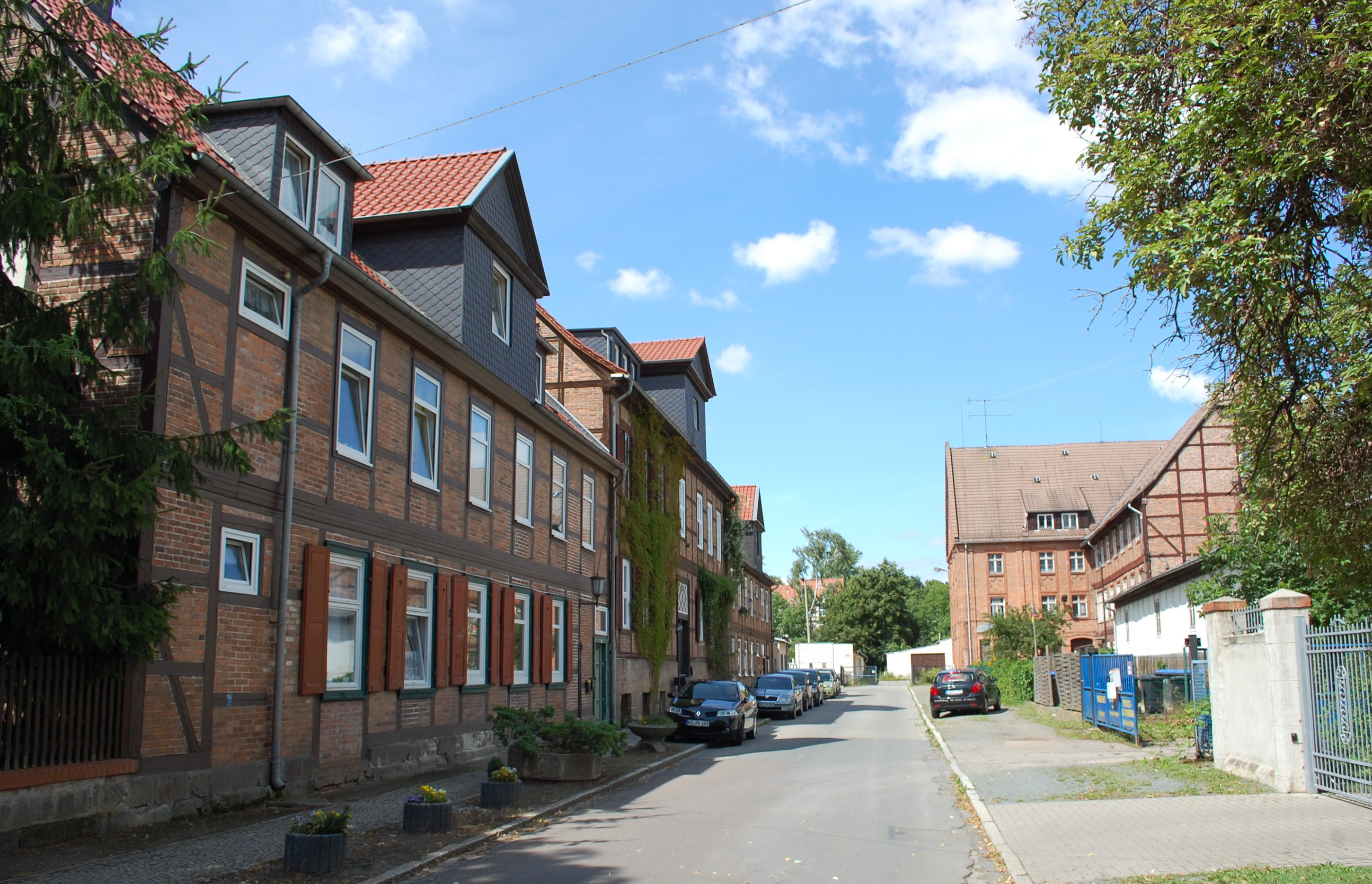 Häuserzeile Severinweg in Quedlinburg